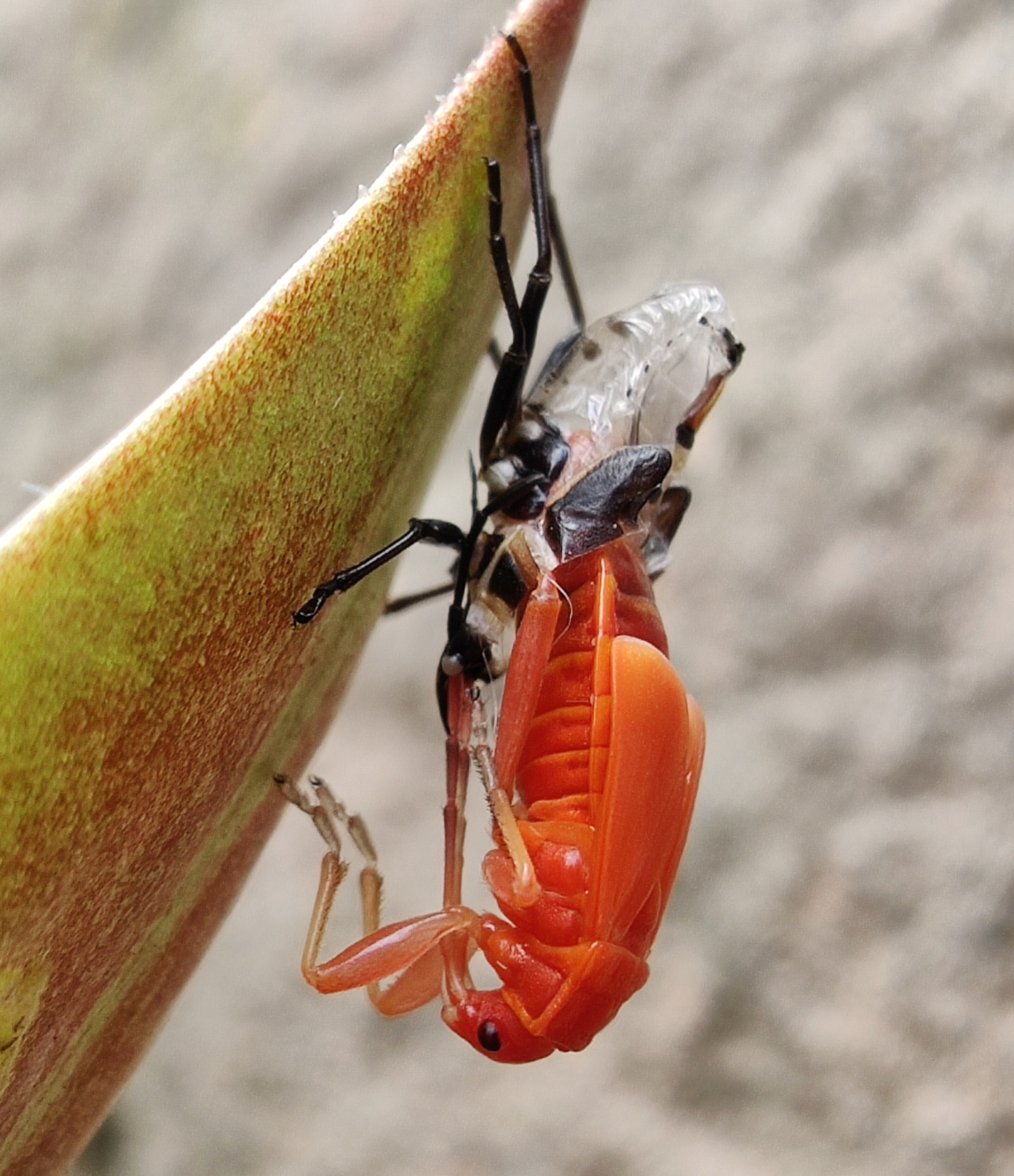 Gemeine Feuerwanze (Pyrrhocoris apterus) bei der Häutung